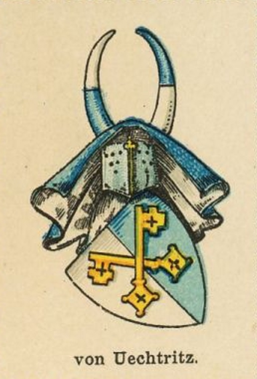 Herb von Uechtritz